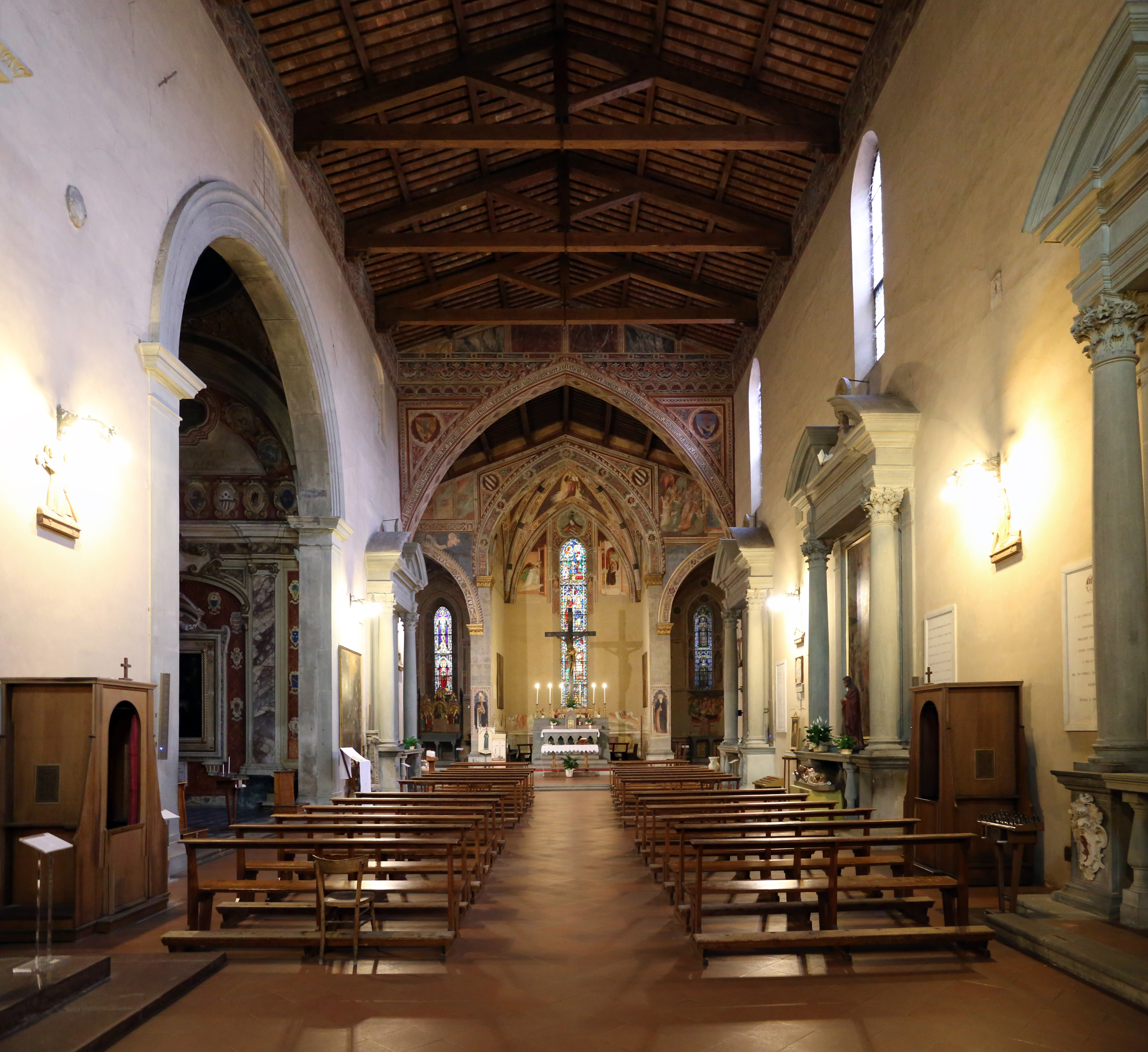 Chiesa di San Francesco This is a photo of a monument which is part of cultural heritage of Italy.